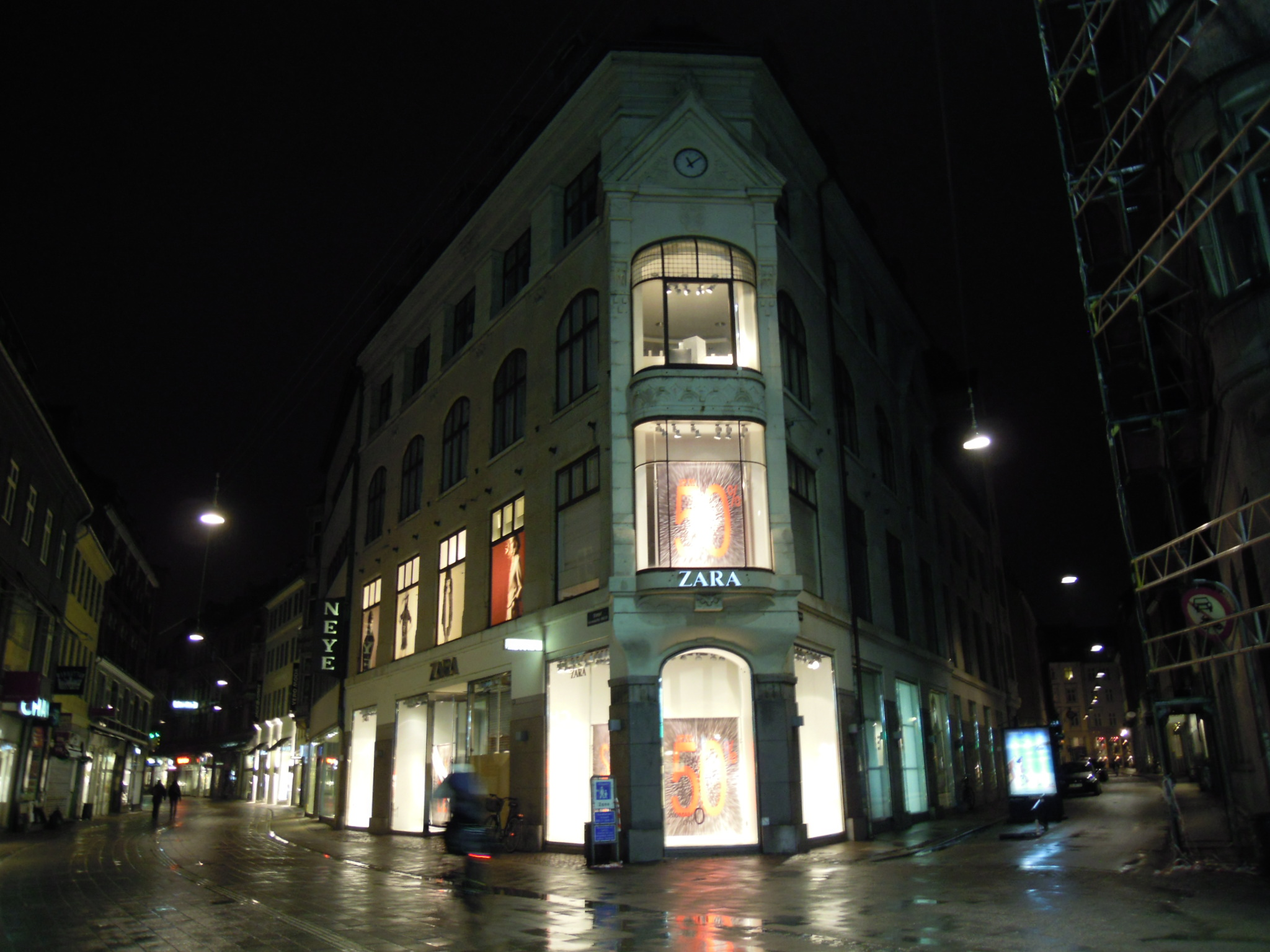 Establecemento de Zara na rúa Vimmelskaftet de Copenhaguen.